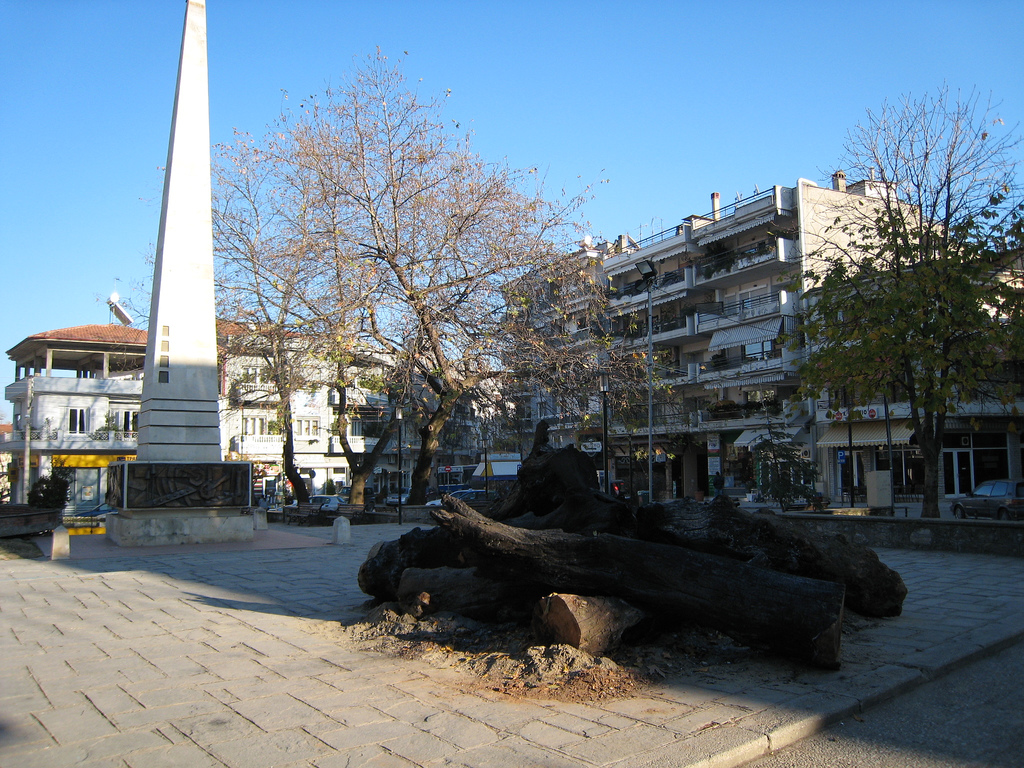 Централният площад на Негуш. Naoussa, Greece central square. Η κεντρική πλατεία της Νάουσας και οι καρτσούνοι [τοπικό έθιμο κατά την περίοδο των Χριστουγέννων]